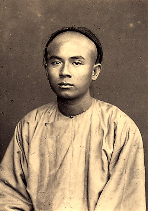 Commerçant chinois à Hanoi (1884-1885).